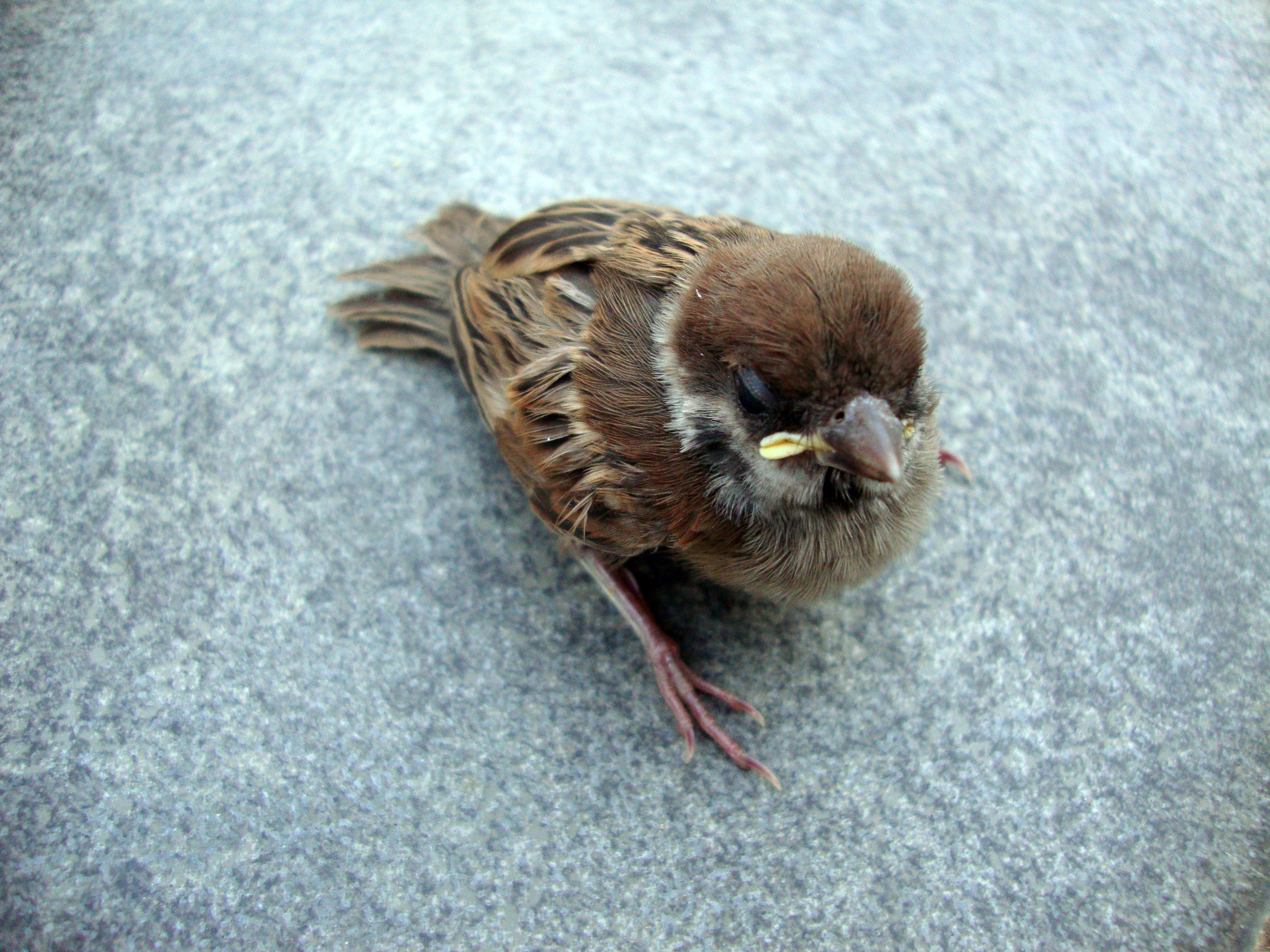 Passer montanus L., 1758